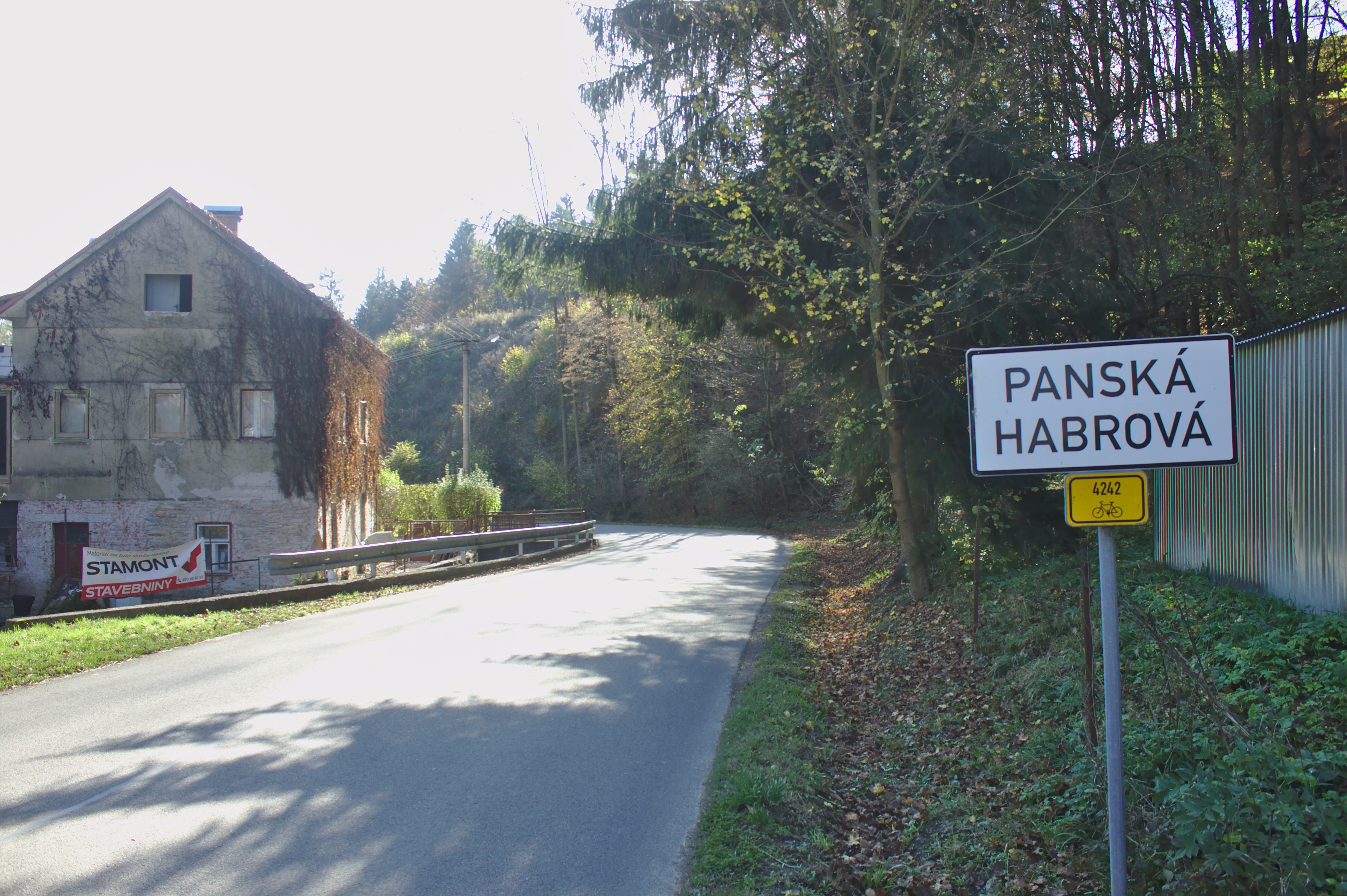 Začátek vesnice ve vesnici Panská Habrová, Královéhradecký kraj